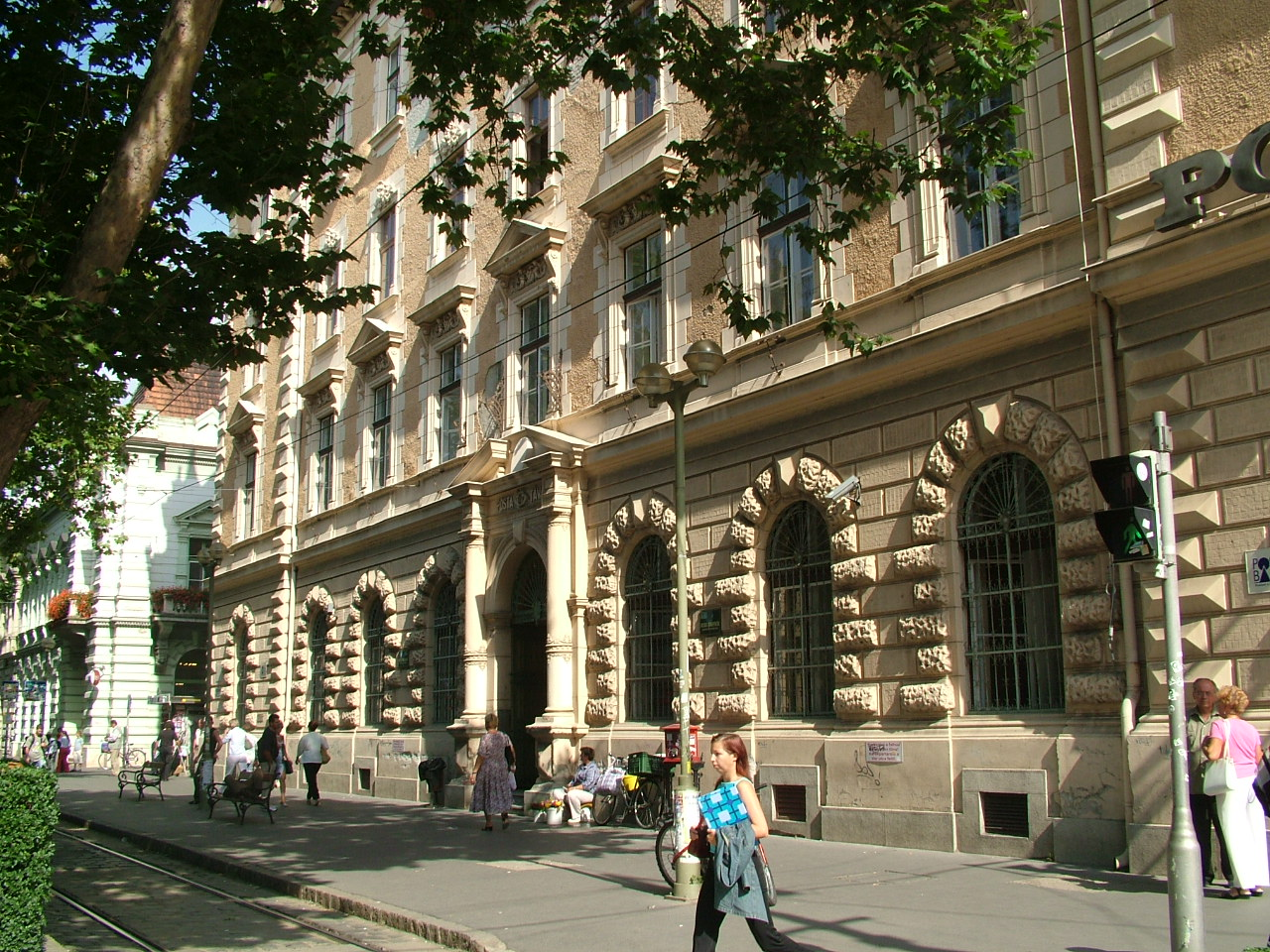 Post in Szeged